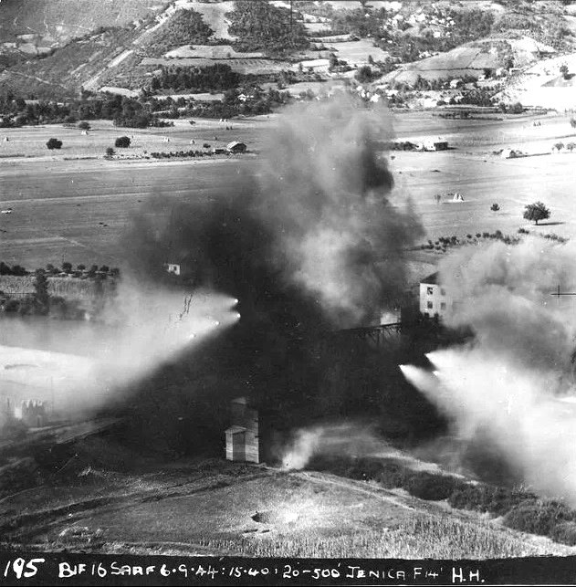 ЗЕНИЦА - БОМБАРДОВАЊЕ ЖЕЉЕЗНИЧКОГ МОСТА, 1944. Г. 16. Сквадрон Јужноафричких зрачних снага (СААФ), који је био стациониран у Италији, током 1944. и 1945. је учинио више десетина ваздушних напада на њемачке снаге, те на колаборационисте у Хрватској, Србији, Словенији, Босни и Херцеговини и сл. 6. септембра 1944. је 16. сквадрон СААФ бомбардовао Зеницу, са фокусом на мостове. Слика показује бомбардовање жељезничког моста узскотрачне пруге, који је спајао Пехаре с Зеницом. Види се јасно њемачки бункер, који још постоји. Остало се да разлучити. Фотографија је високог квалитета и све се лијепо види.